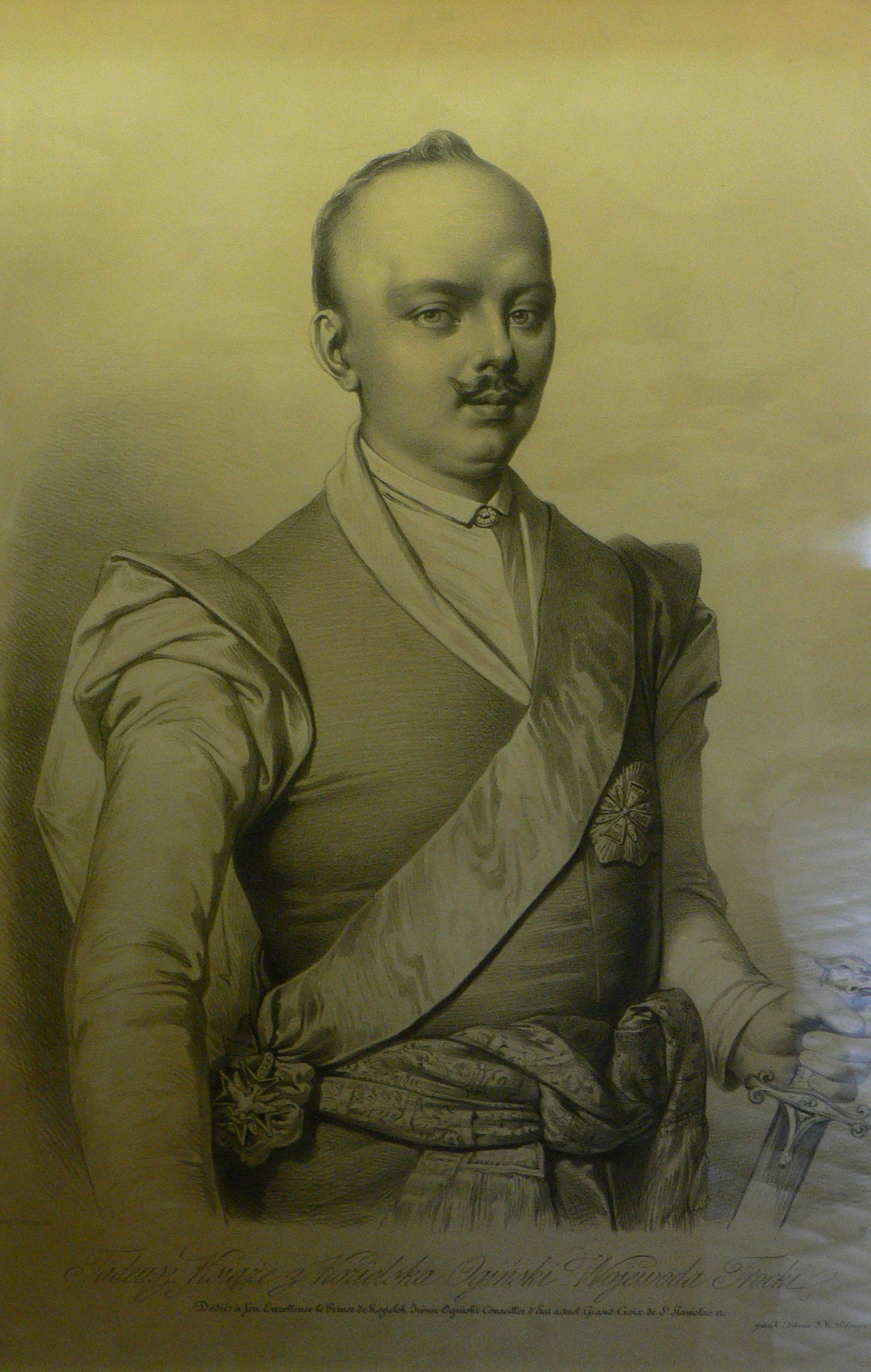 Tadeusz Franciszek Ogiński (1712-1783), voivode of Trakai